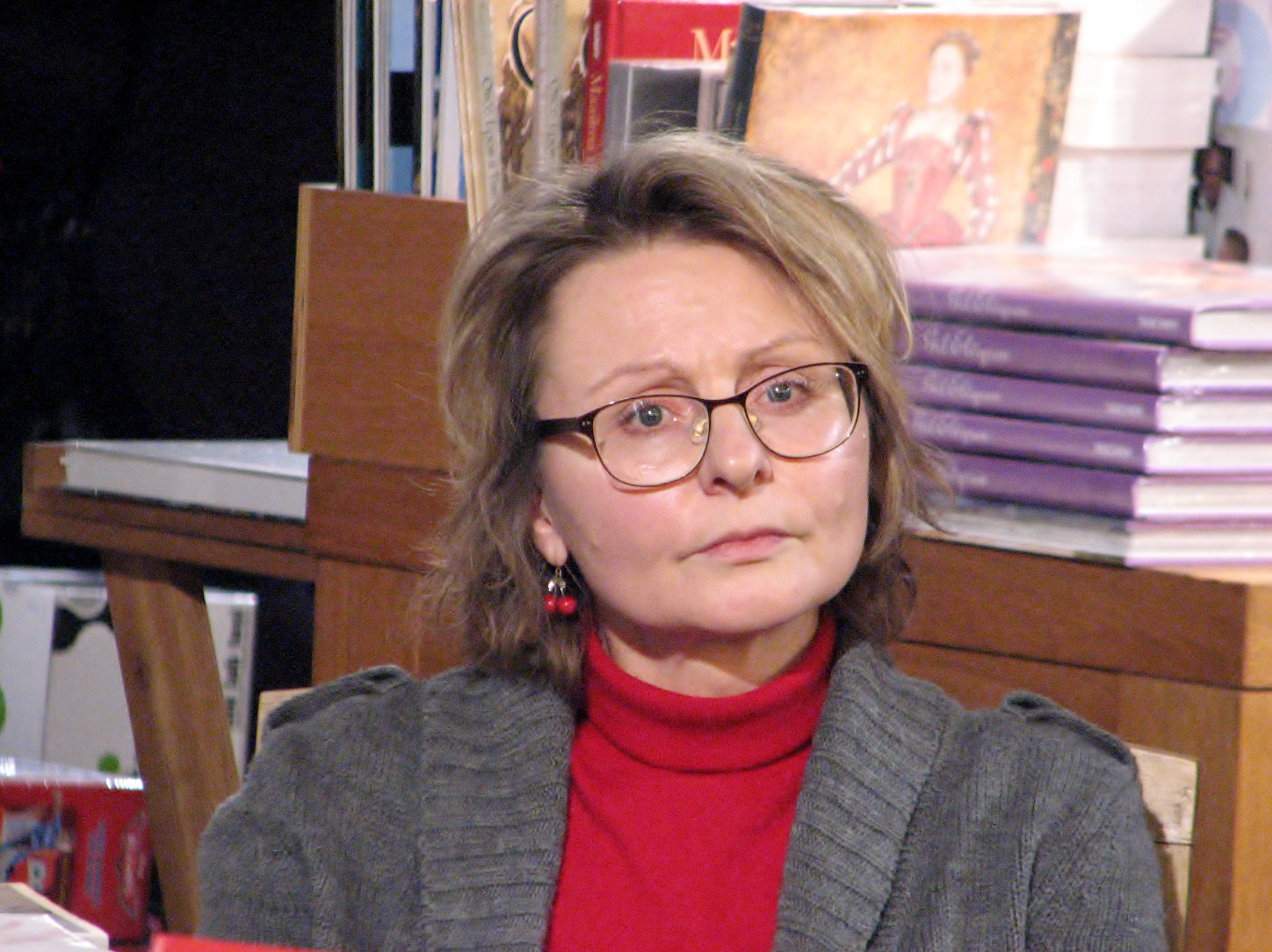 Veronika Einberg Andrei Ivanovi raamatu "Harbini ööliblikad" esitlusel Viru keskuse Rahva Raamatus